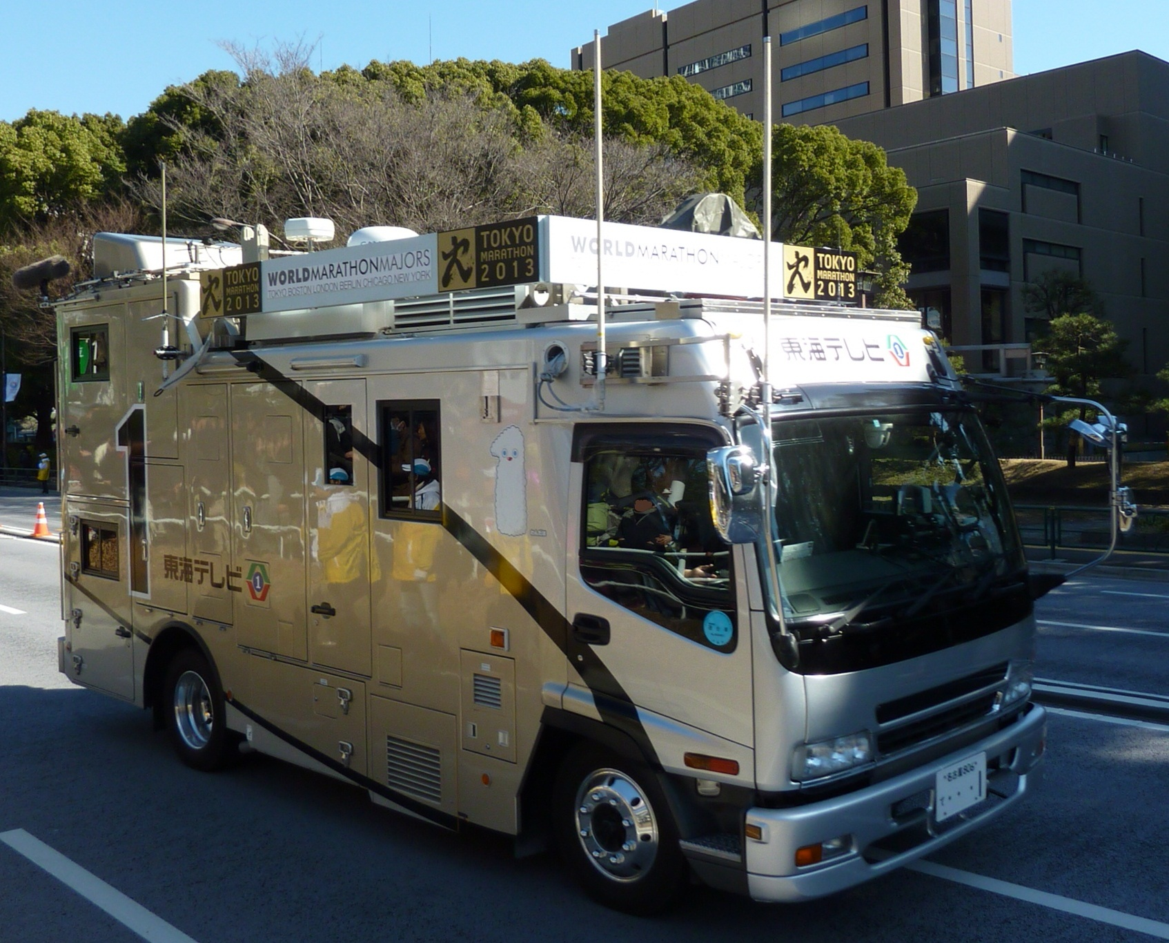 東京マラソン2013 東京都港区で撮影。 トリミング処理済。